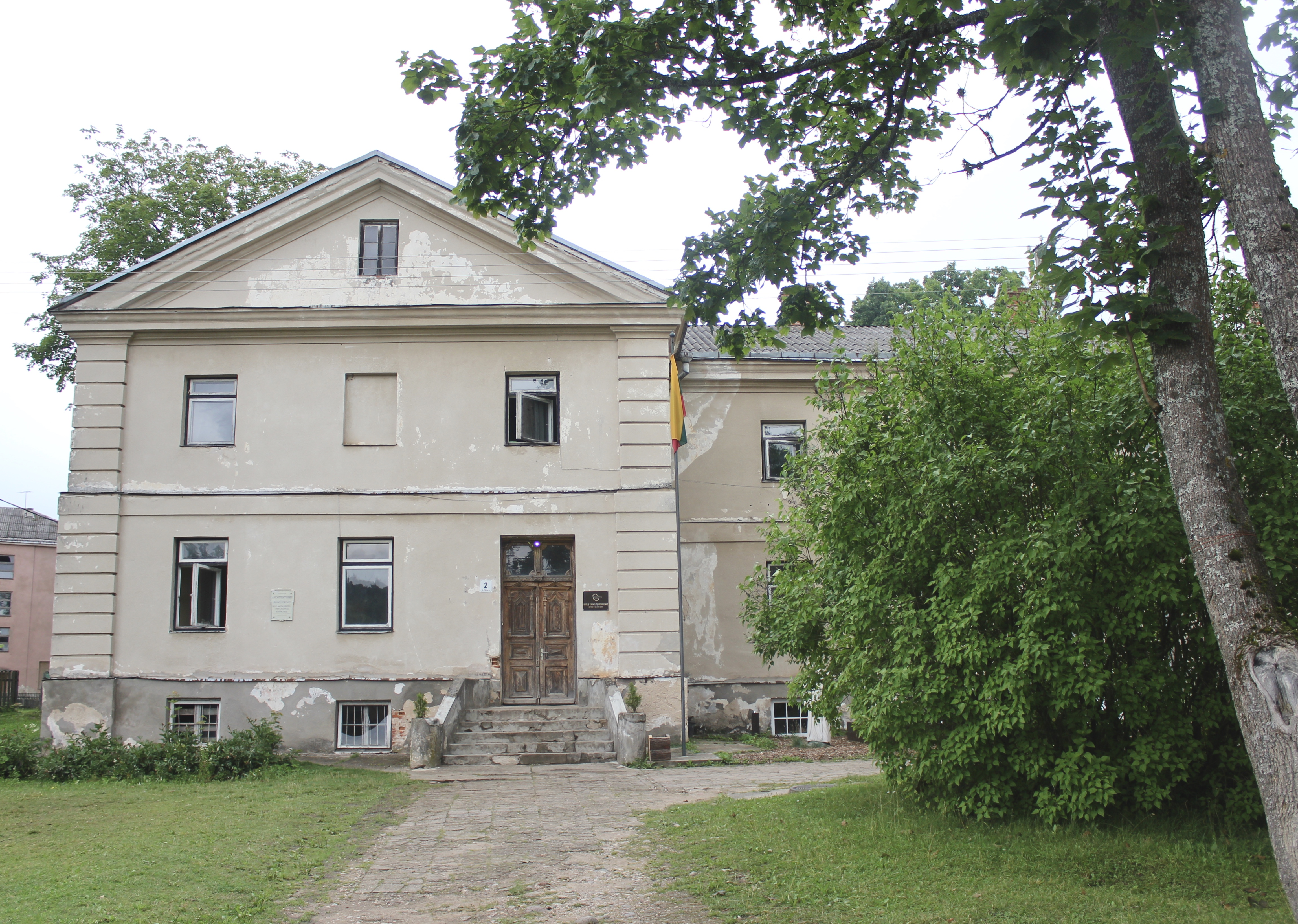 Basųjų karmeličių vienuolynas, kuriame nuo 2016 metų teikiamos nakvynės paslaugos